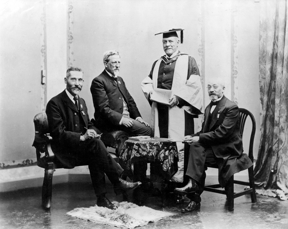 3. Esperanto-Weltkongress, Cambridge 1907. Die Organisatoren. V.l.n.r.: Joseph Rhodes, Theophile Cart, John Pollen, Ludwik L. Zamenhof